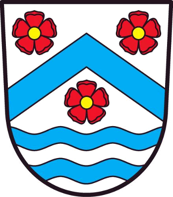 Znak obce Mokrý Lom, okres České Budějovice